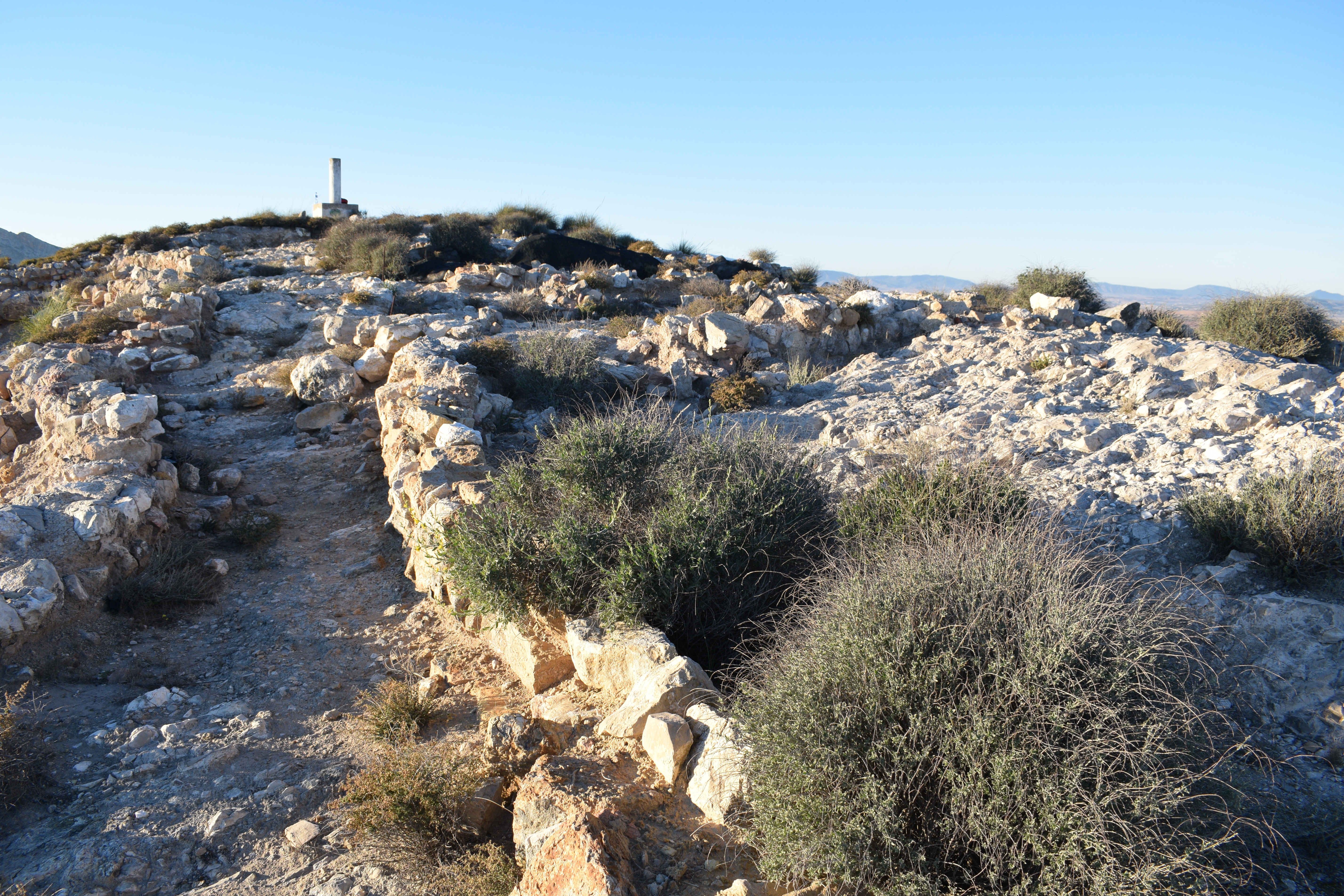 Villena.